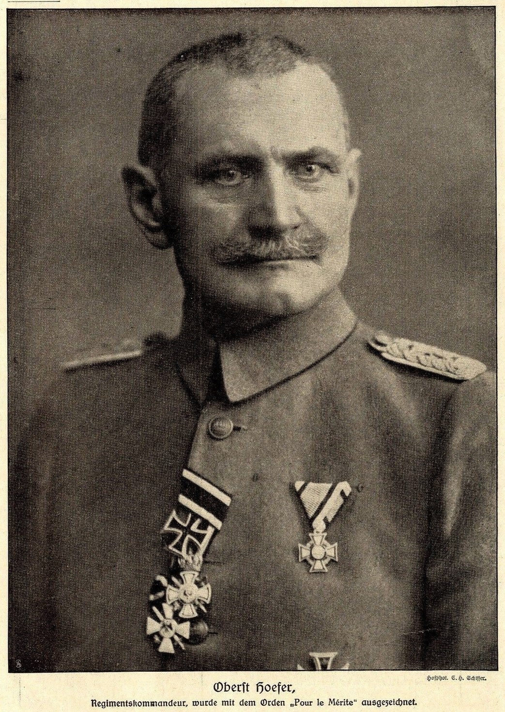 Oberst Karl Hoefer wurde mit dem "Pour le Mérite" ausgezeichnet, 1916